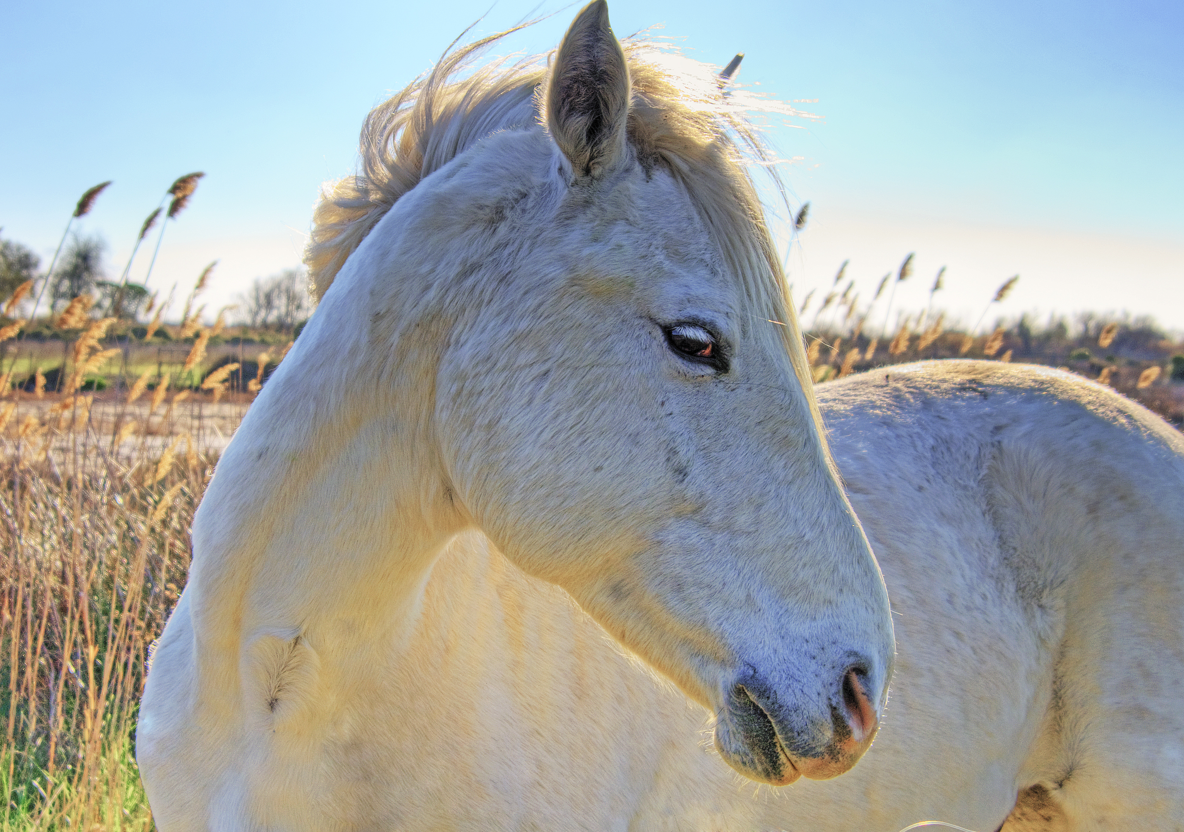 Cheval de Camargue en liberté dans sa région d'origine